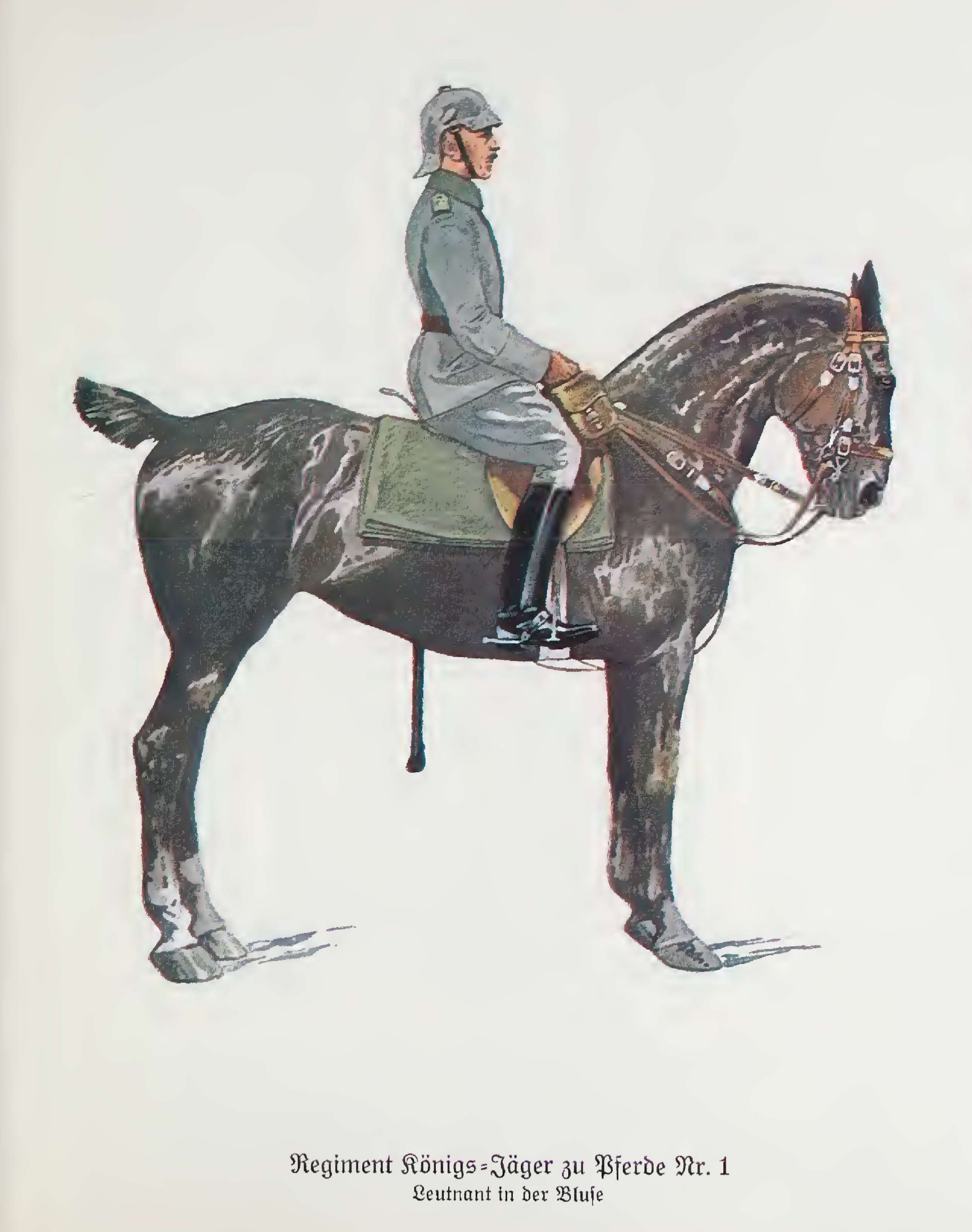 Reiter des Königs-Jäger-Regiments zu Pferde Nr. 1 in feldgrauer Uniform, 1915